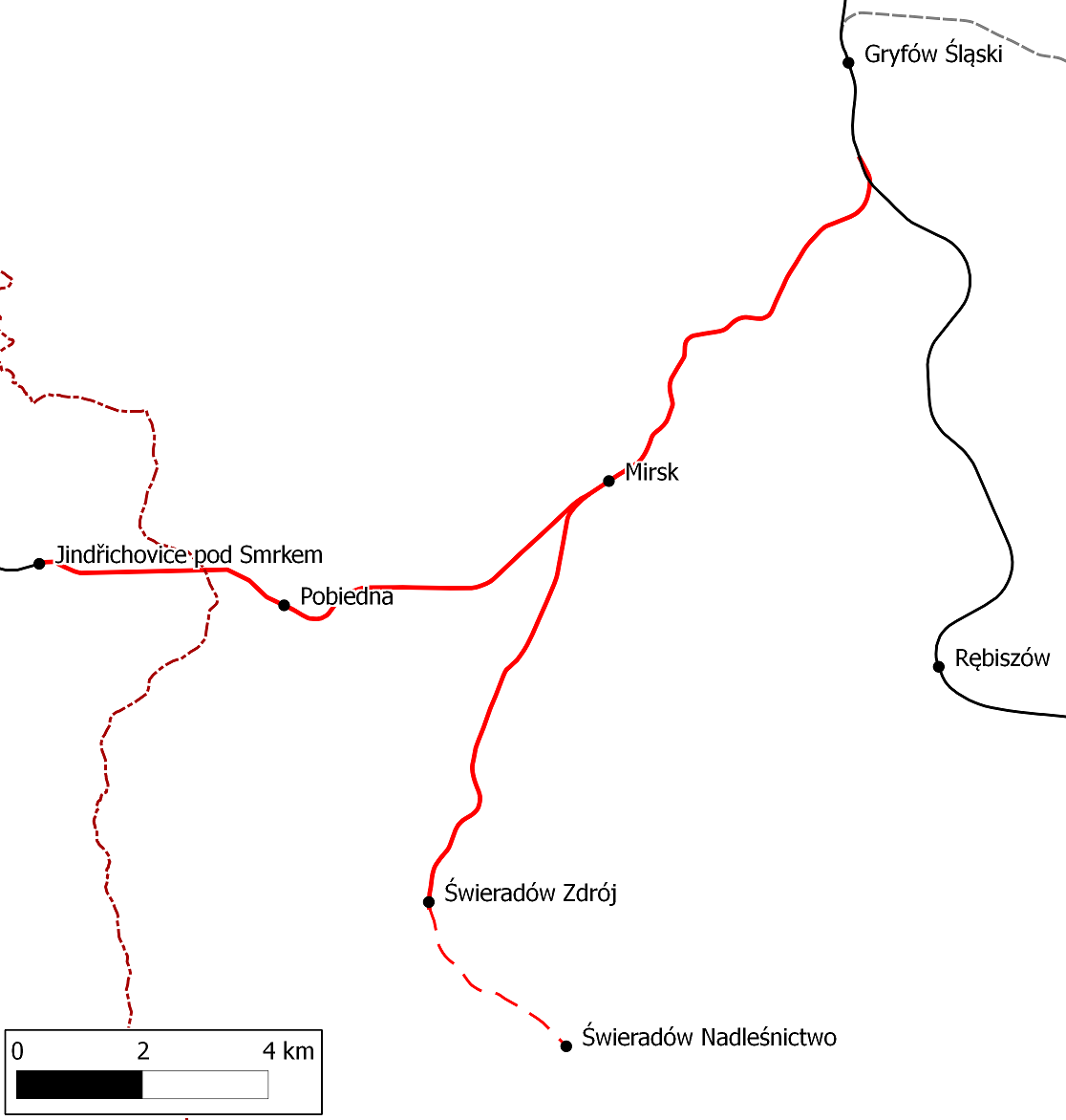 Mapa przedstawiająca zasięg planowanych do reaktywacji linii kolejowych w ramach projektu "Kolej Gór Izerskich" (na czerwono).